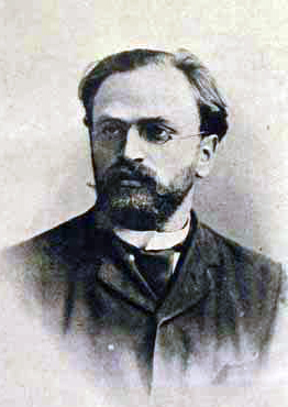 Рязанов, Давид Борисович в 1890-е годы